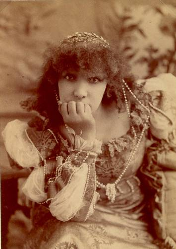 French stage actress Sarah Bernhardt (1844-1923)